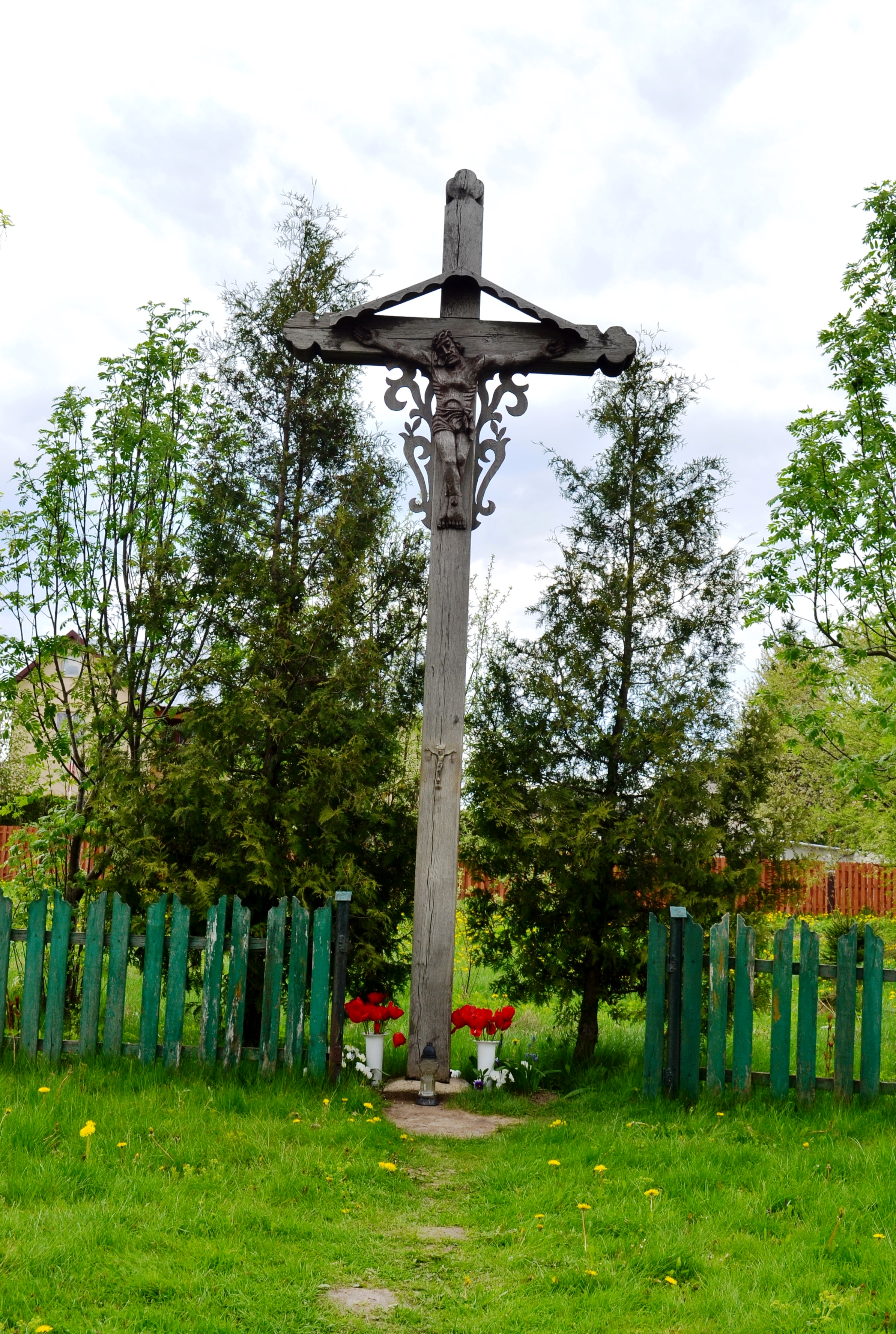 Kryžius prie Šivickio st., Guriai, Vilnius